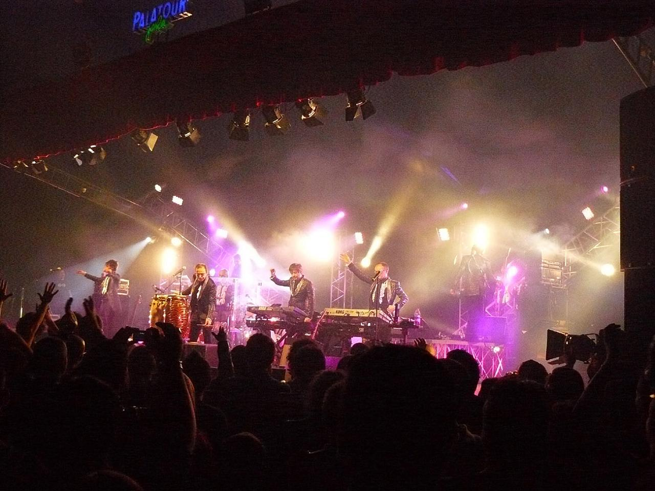 Studentessi tour 2008 - Bitritto 4 maggio